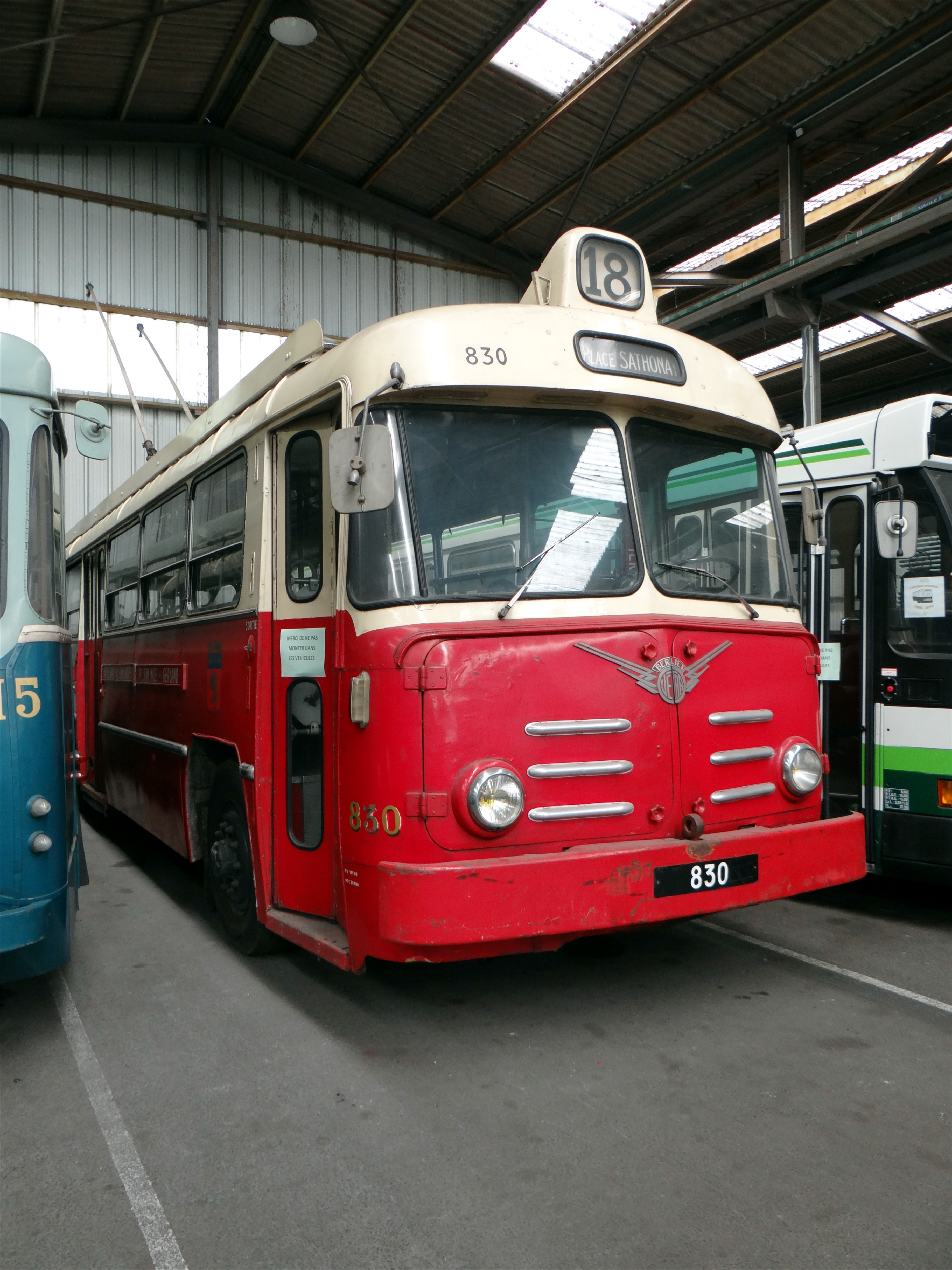 Trolleybus Vetra-Berliet de type VA3B2 N° 830 de 1954 - Lyon. Musée des transports urbains, interurbains et ruraux, Chelles, Seine-et-Marne, France.